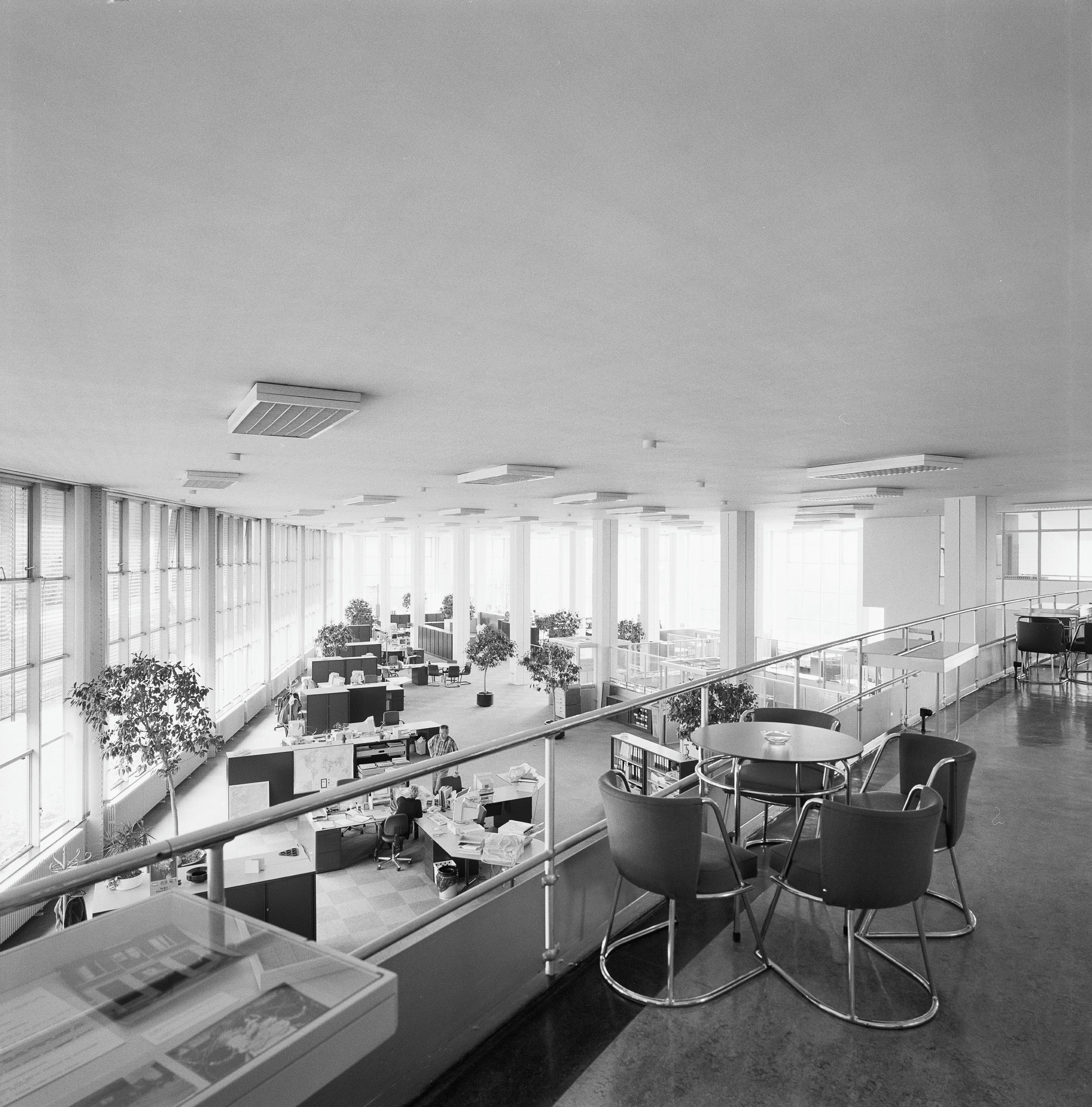 (voormalige) Van Nellefabriek, - Fabriekscomplex: Interieur, originele stalen meubelen (Gispen) op de galerij van de entresol met uitkijk over gerenoveerde kantoorzaal